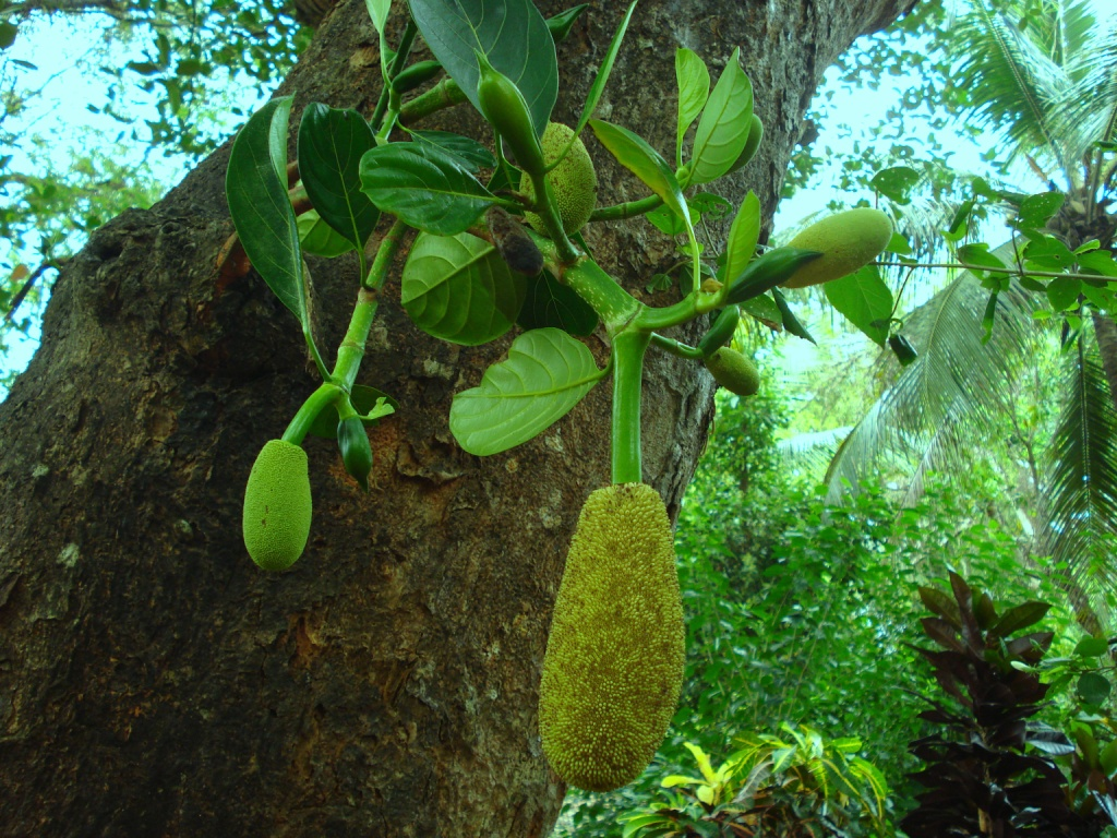 ചക്ക